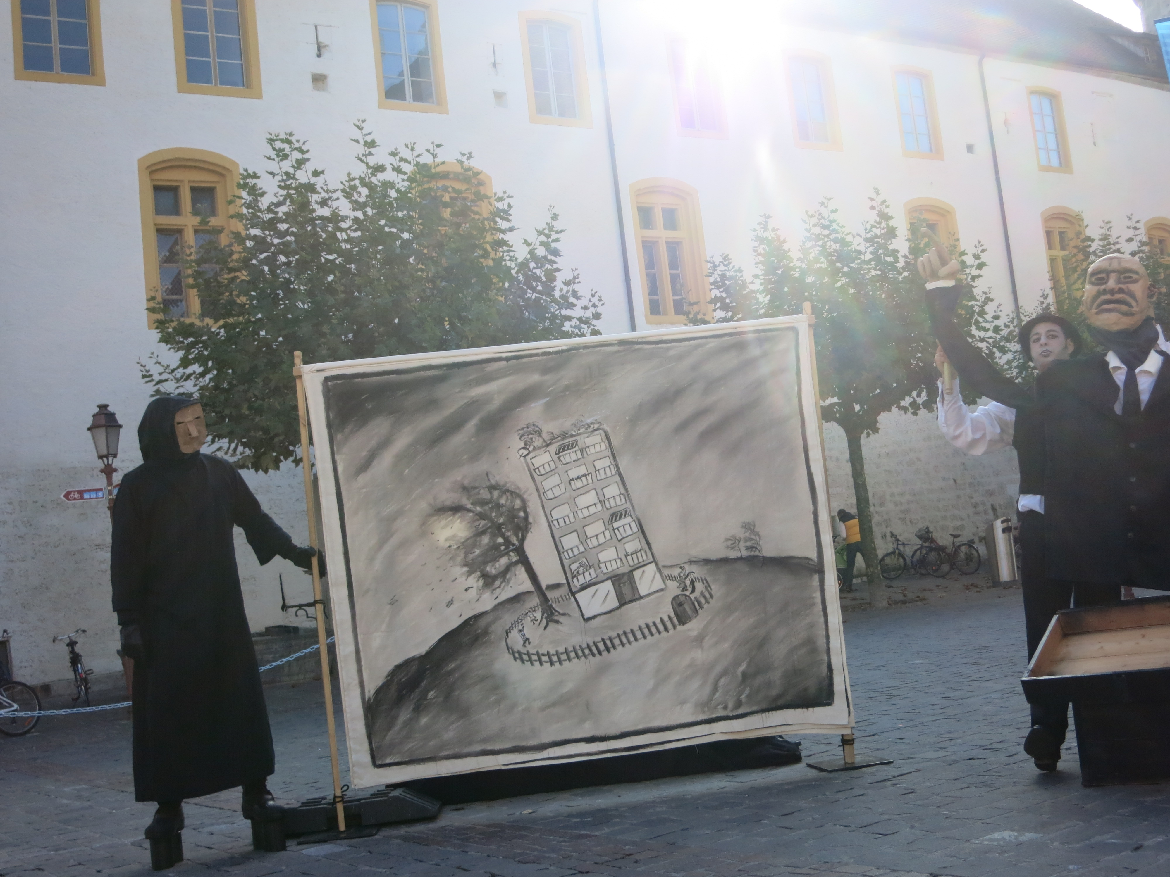 Spectacle "Murmure la rumeur" de Zanco, cie genevoise de théâtre de rue, créé en 2005 et repris en 2012. Ici lors de "Rue Libre" à Yverdons-les-Bains.